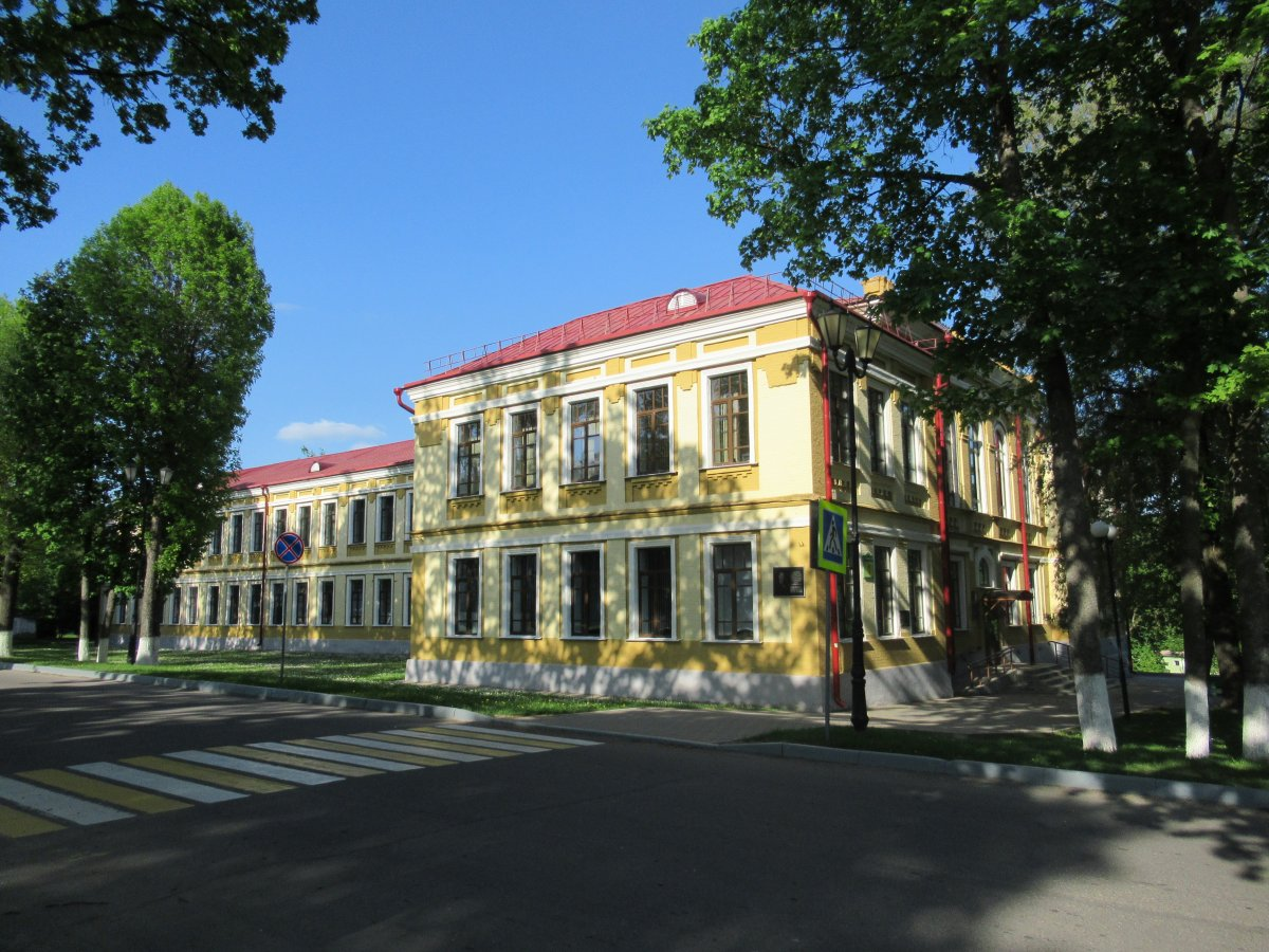 Горкі. Краявіды